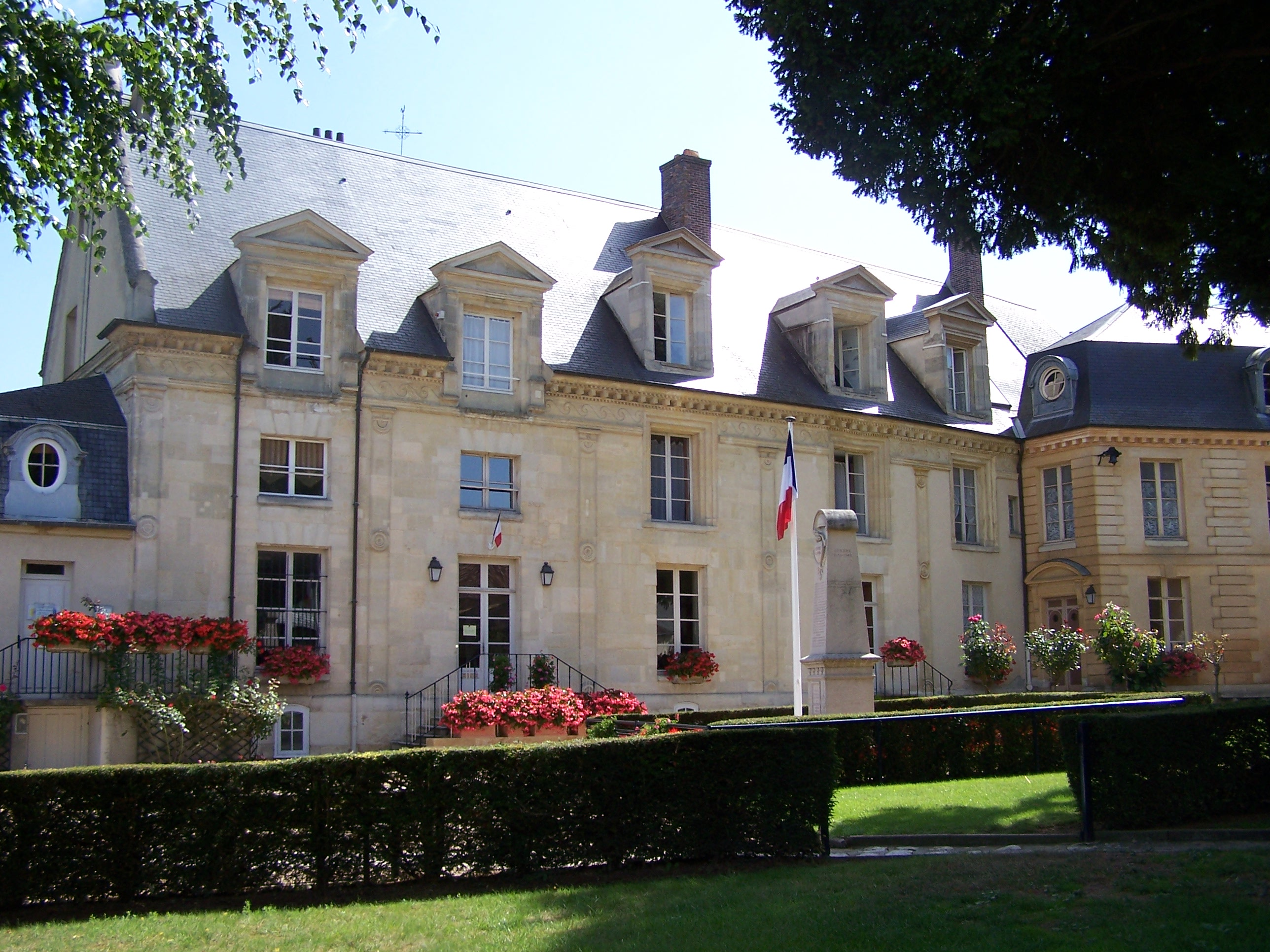 Hôtel de ville de Bazemont (Yvelines, France). Photo personnelle. Town hall of Bazemont (Yvelines, France). Personal photo. Auteur/Author : Henry Salomé